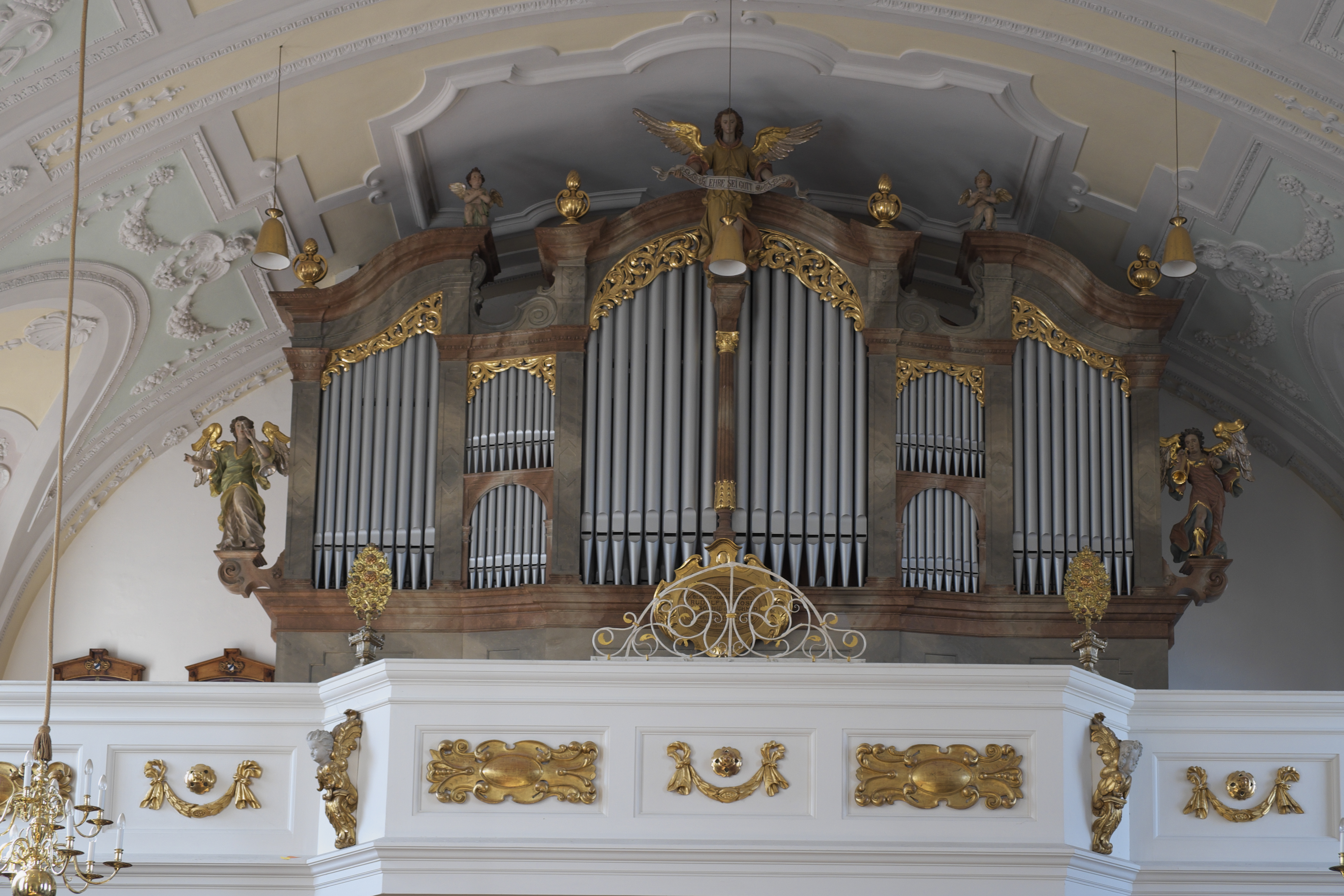 Katholische Pfarrkirche St. Michael in Seeshaupt im Landkreis Weilheim-Schongau (Bayern/Deutschland), Orgel